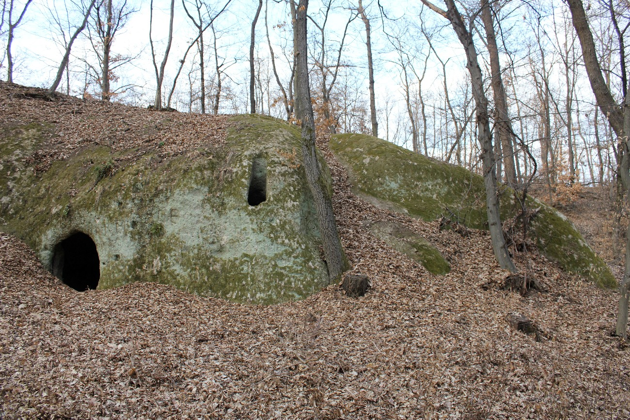 H4d, Demjén, Remete-völgy